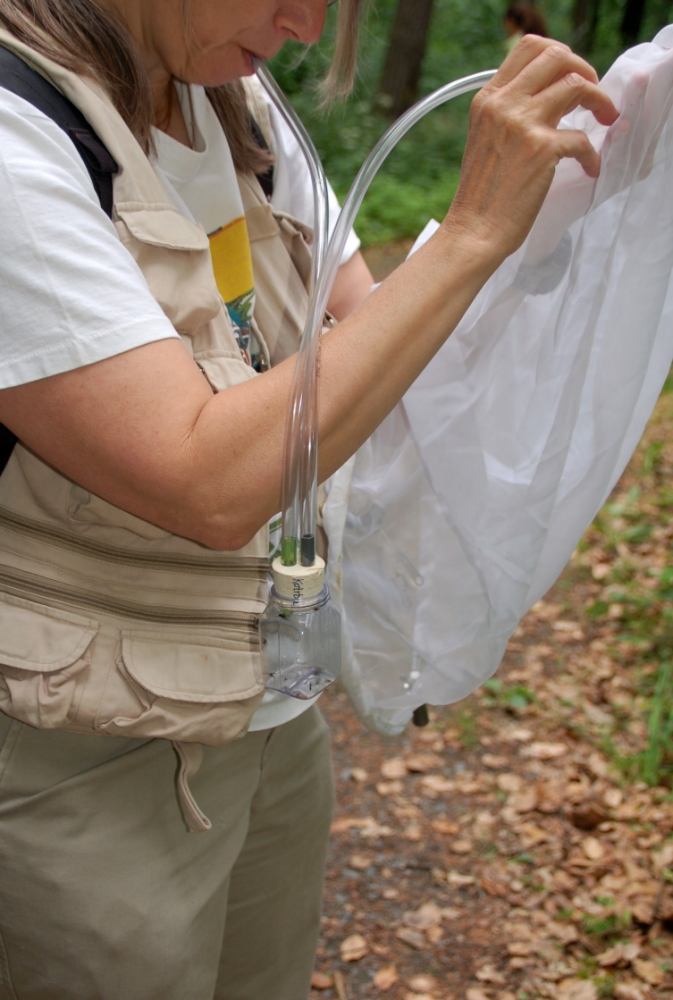 Sammeln von Insekten mit einem Exhaustor, 10 km östlich Pirna, Sächsische Schweiz, Sachsen, Deutschland